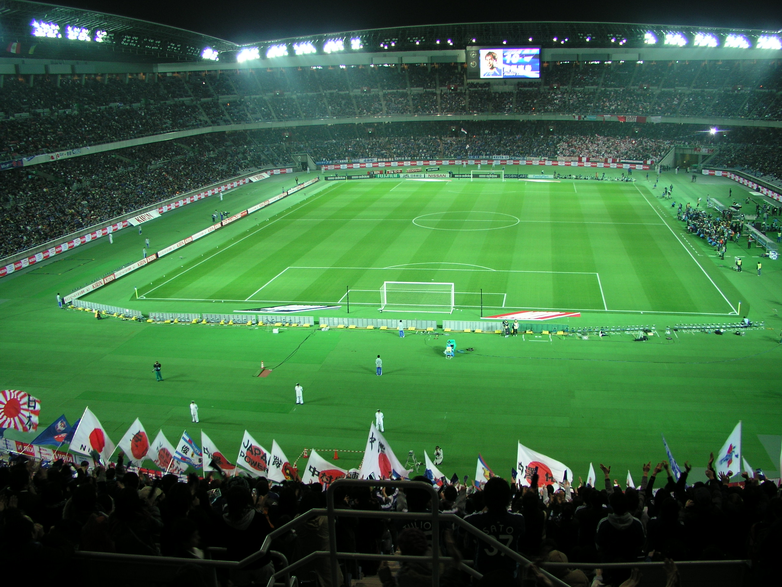 日本代表 VS ペルー代表